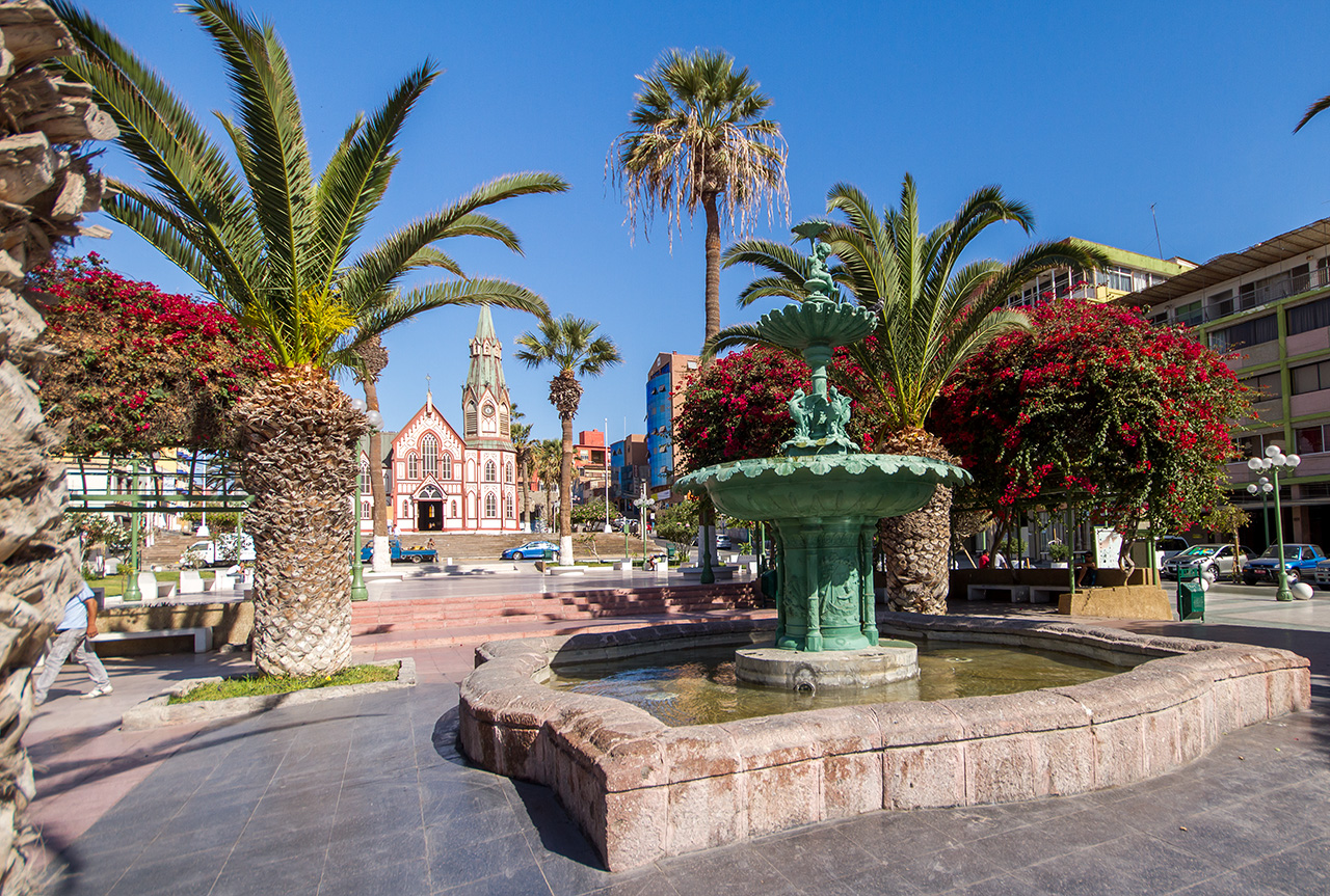 Catedral de San Marcos desde Plaza Colón. This is a photo of a national monument in Chile: 522